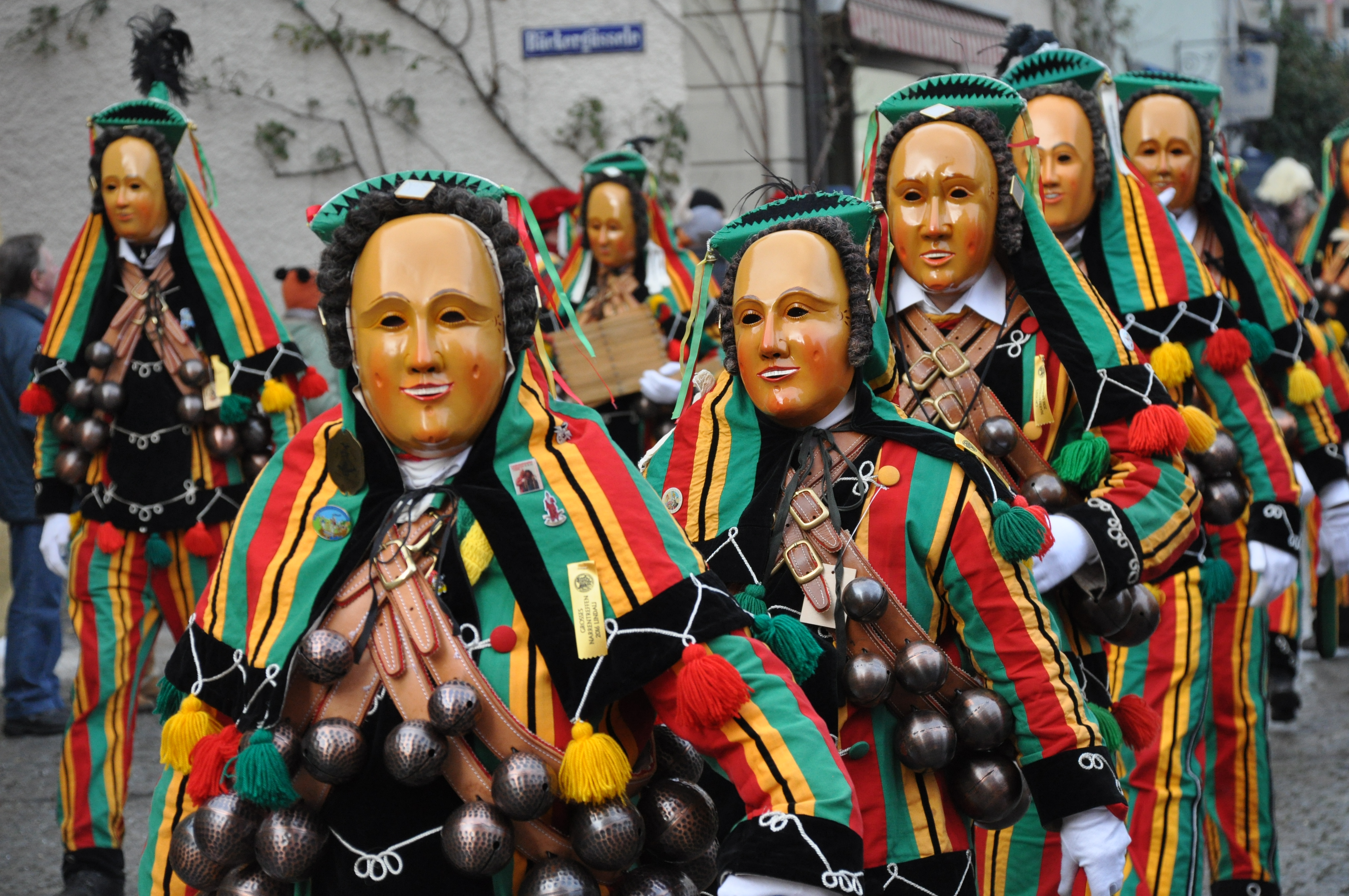 Narrenzunft Wellendingen e. V.; Narrenfiguren: Schellnarr Fotografiert beim Großen Narrentreffen der Vereinigung Schwäbisch-Alemannischer Narrenzünfte (VSAN) in Lindau; Narrensprung am Sonntag, 24. Januar 2016.